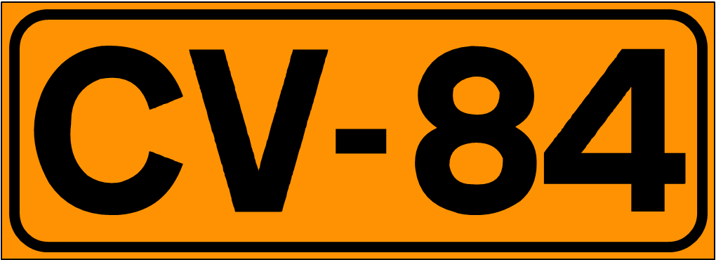 Inidcador de la Carretera de la Comunidad Valenciana CV-84